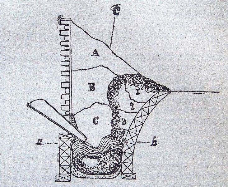 Каталонське горно. Схема каталонського горна за Франсуа.